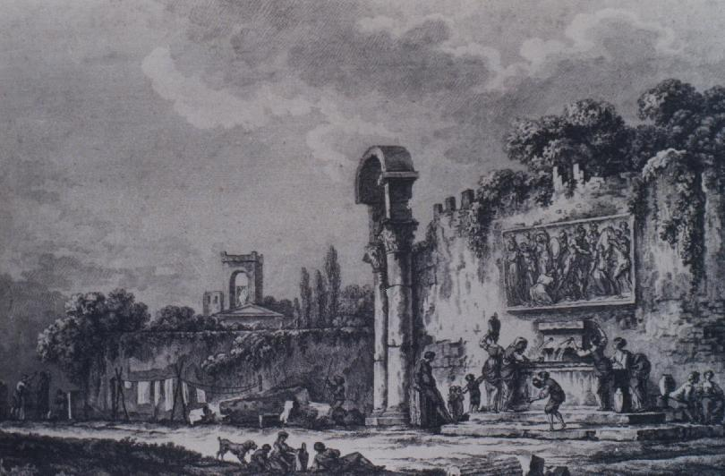 Fontana vecchia di Santa Sofia, Benevento. Acquaforte